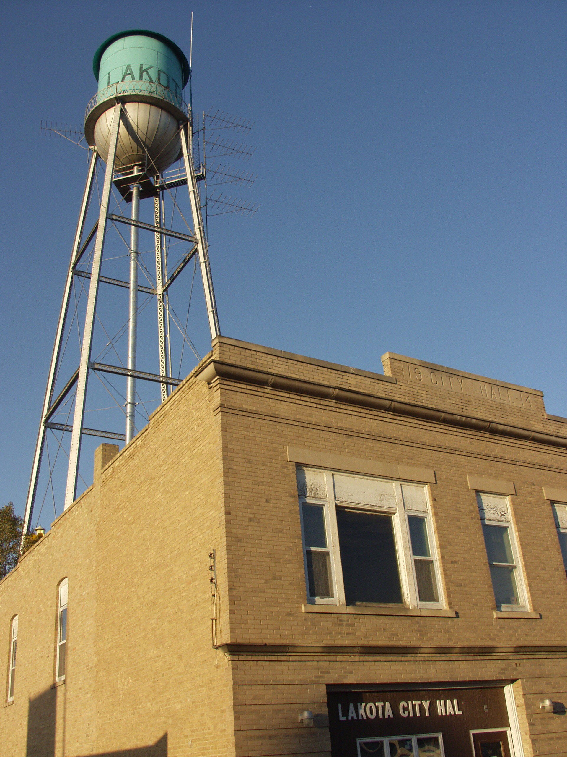 Lakota, North Dakota. From .